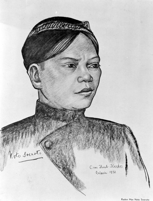 Repronegatief. Raden Mas Noto Soeroto 1888-1951 geboren: 5 juni 1888 te Yogyakarta overleden: 25 november 1951 te Solo . Tekening met een portret van Raden Mas Noto Soeroto, door C. van Huut Kardos (Batavia 1932)